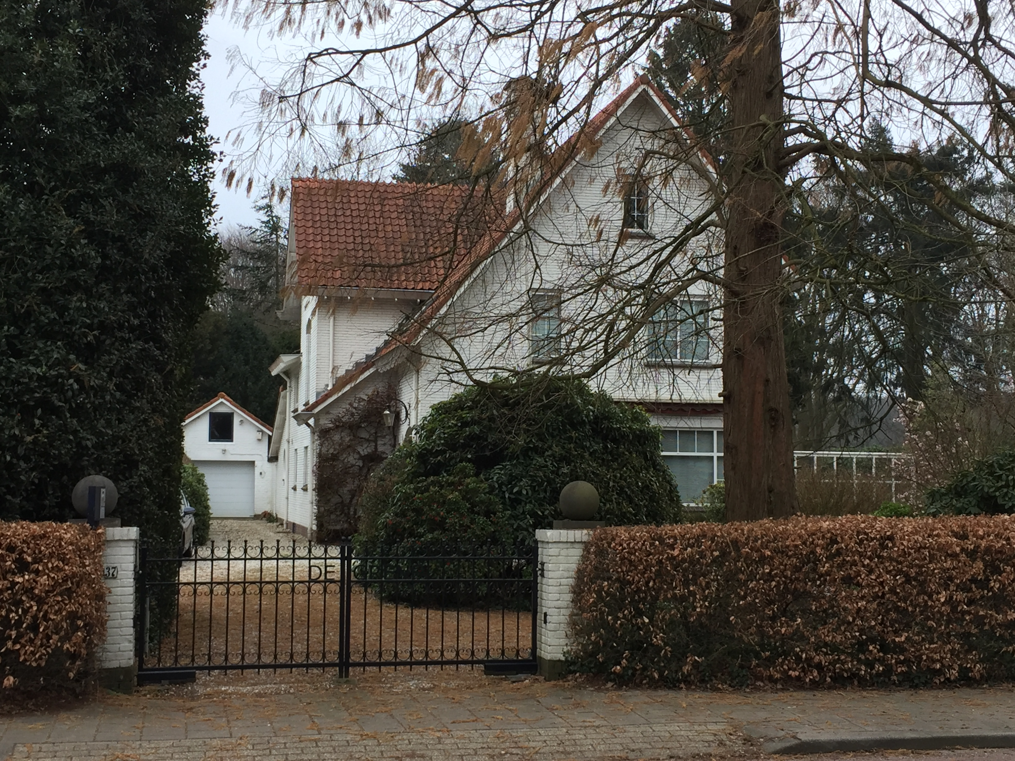 Het huis aan de Bovenweg 37 in Bennekom. Helena Kuipers-Rietberg, alias tante Riek, oprichtster van de Landelijke Organisatie voor Hulp aan Onderduikers, zat in augustus 1944 ondergedoken in dit huis bij de sigarenfabrikant-Van Schuppen. Zij werd op 17 augustus 1944 in dit huis aangehouden door de Duitse bezetter. Kuipers-Rietberg overleed op 27 december 1944 in concentratiekamp Ravensbrück